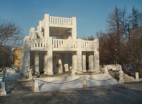 Памятник жертвам интервенции 1918-1920 годов в Мурманске